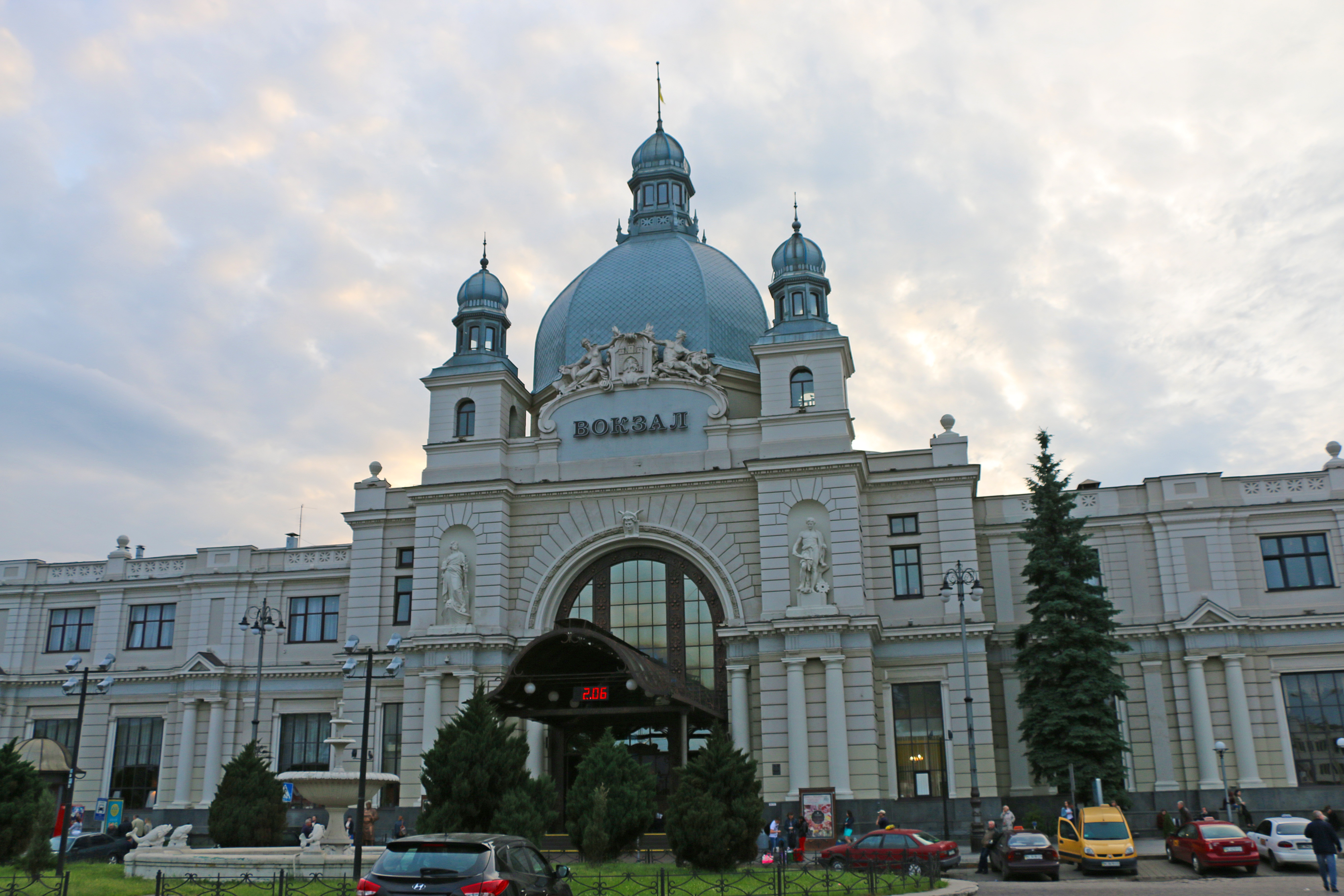 зал. двірець (Головний вокзал), Львів, Двірцева пл.